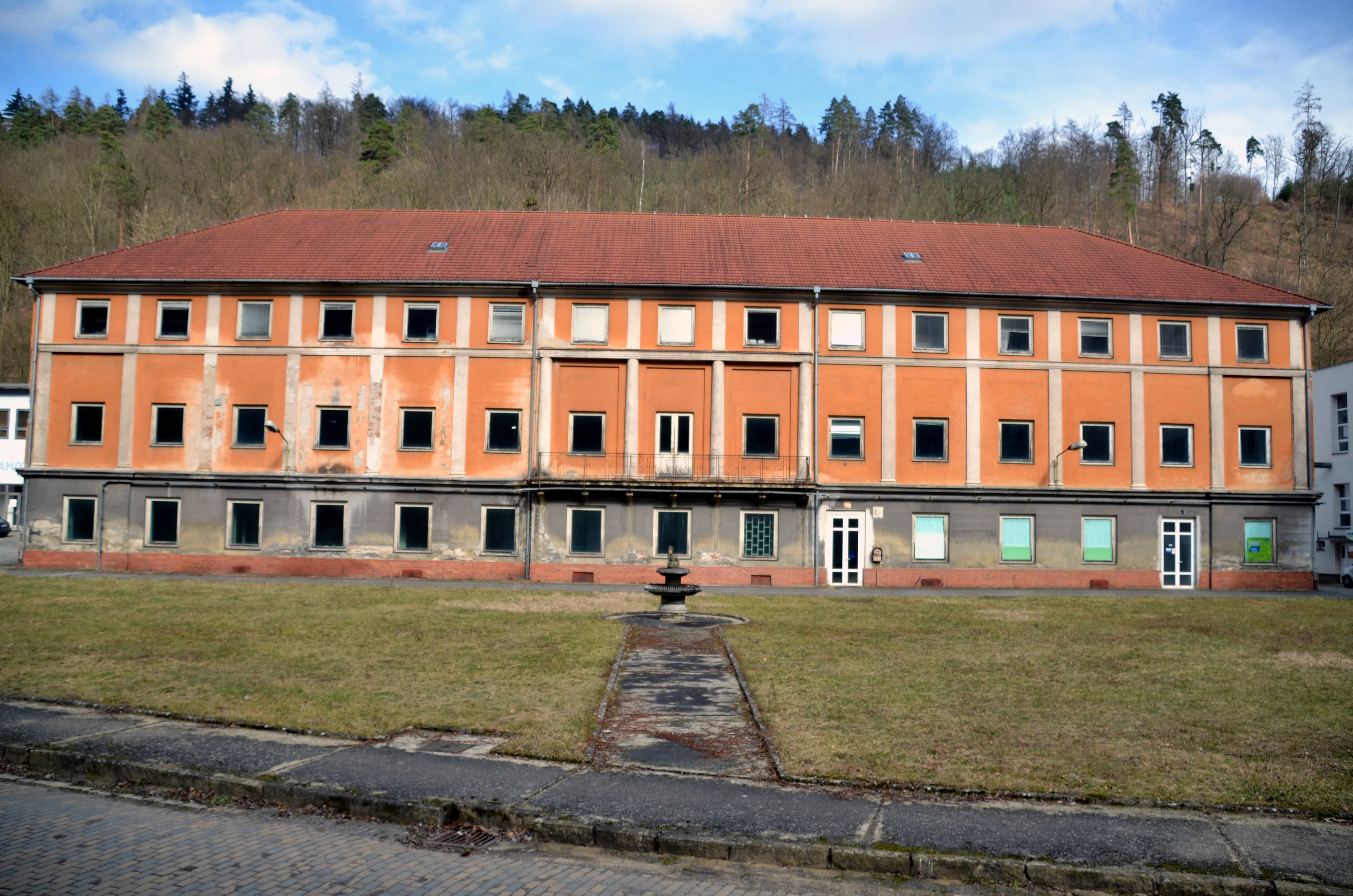 Západní průčelí zámku v Adamově